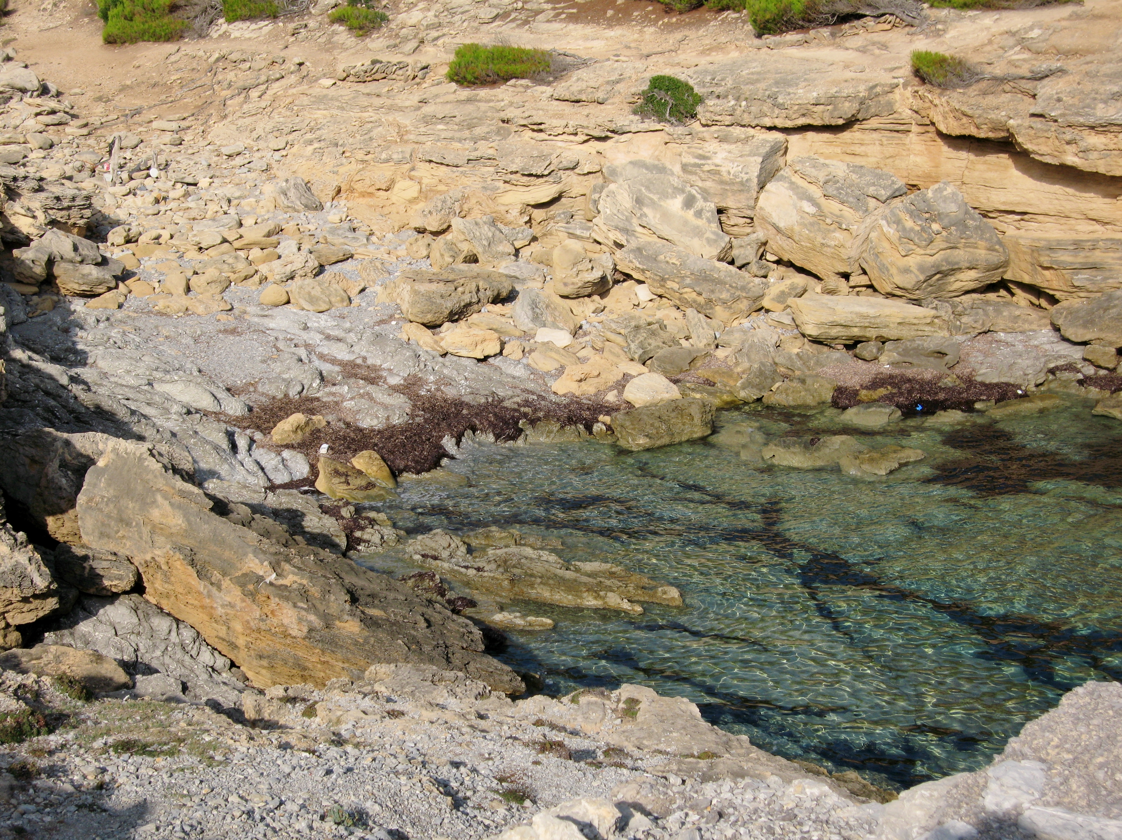 Cala Estreta, Artà, Mallorca, Spain